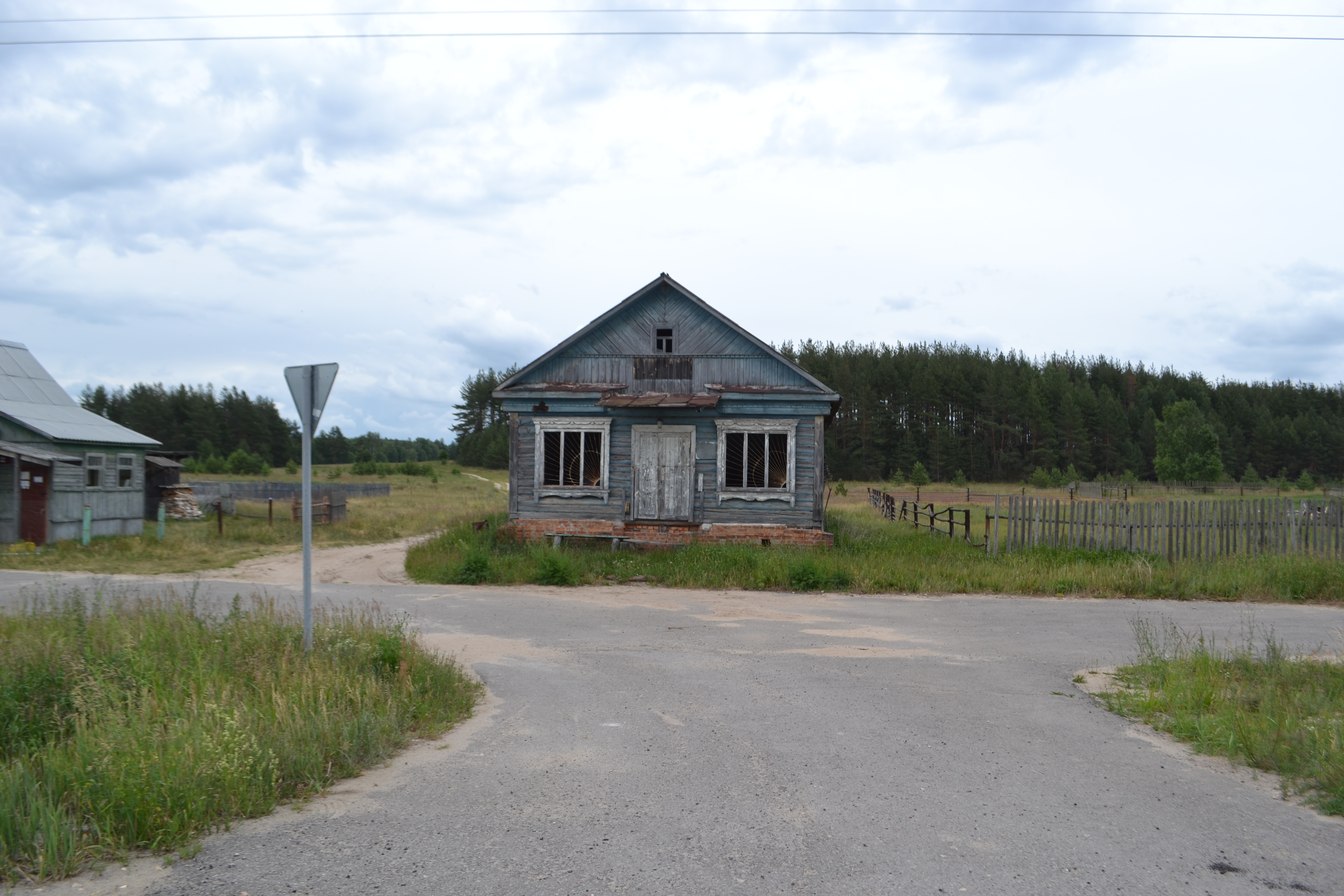 Бывший магазин в деревне Ворово (Шатурский район)